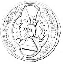 Siegel des Markgrafen Wilhelm von Hachberg-Sausenberg